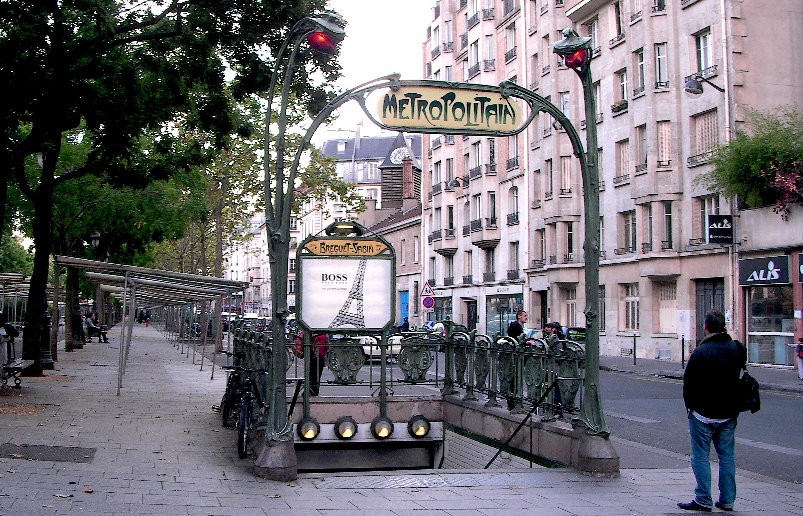 Édicule Guimard de la station Bréguet - Sabin (Inscrit) .